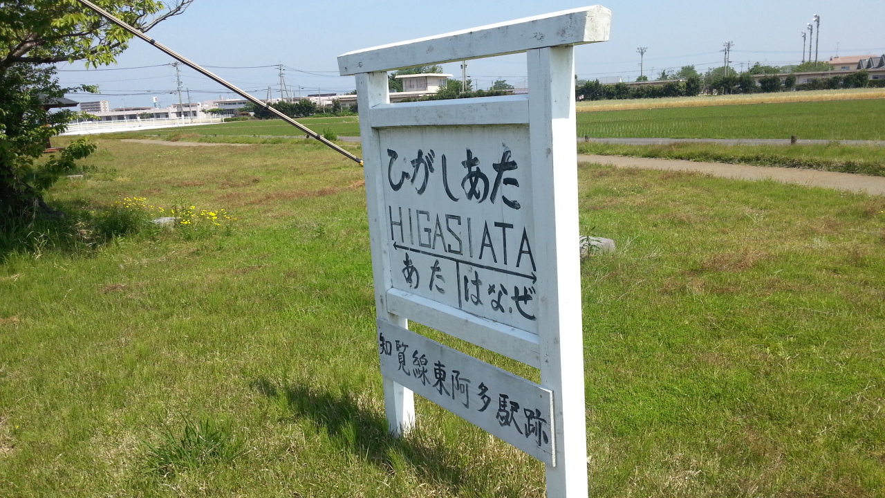 南薩鉄道 東阿多駅跡に残る記念碑。裏に駅の当時の様子が記載されている。周囲は線路跡と思われる遊歩道がある。水路沿いの芝生に立っている。